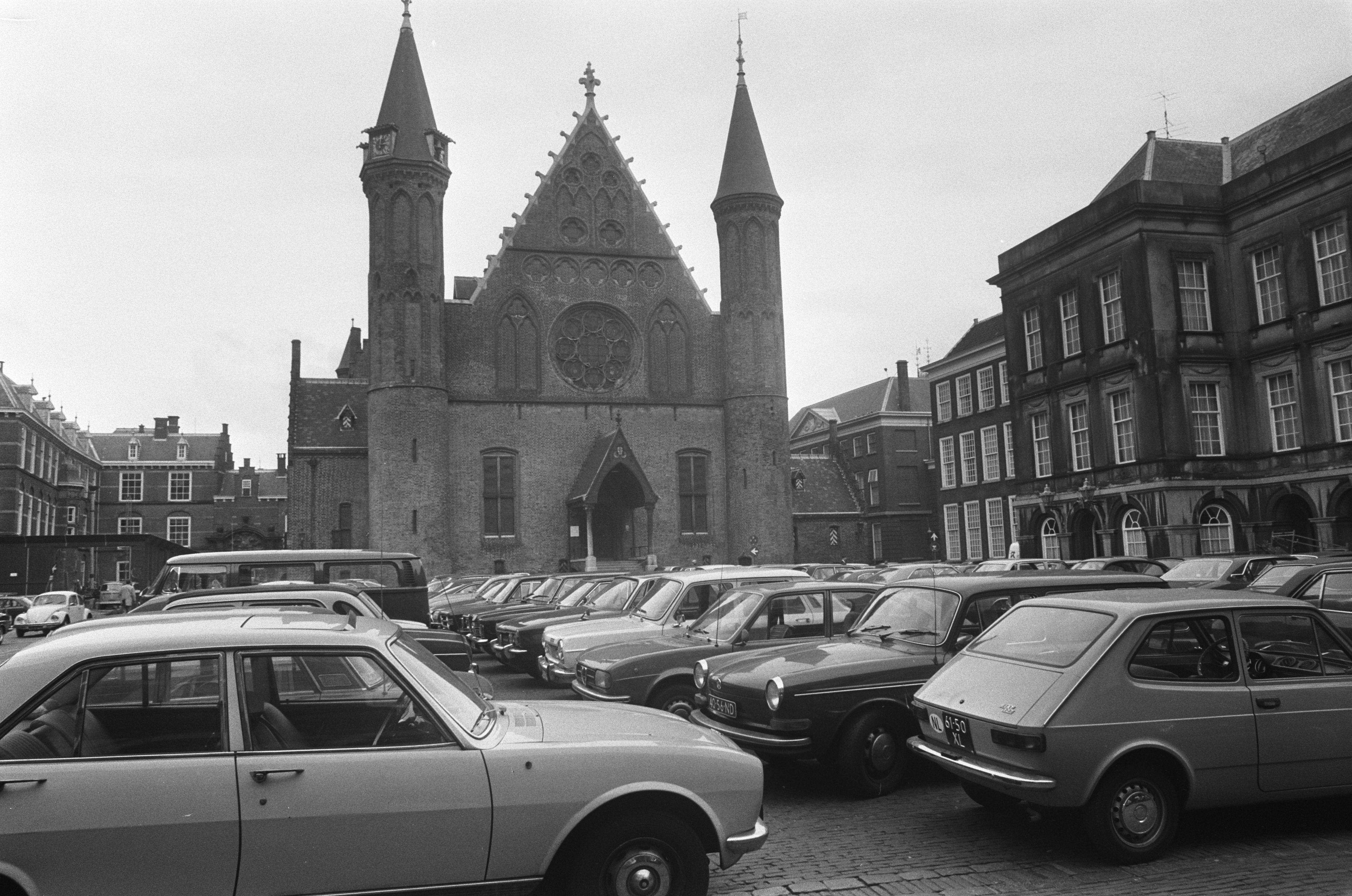 Collectie / Archief : Fotocollectie Anefo Reportage / Serie : [ onbekend ] Beschrijving : Tweede Kamer stemt over autovrij Binnenhof, overzicht Binnenhof met autos Datum : 7 mei 1974 Trefwoorden : auto's Instellingsnaam : Tweede Kamer Fotograaf : Peters, Hans / Anefo Auteursrechthebbende : Nationaal Archief Materiaalsoort : Negatief (zwart/wit) Nummer archiefinventaris : bekijk toegang 2.24.01.05 Bestanddeelnummer : 927-1743